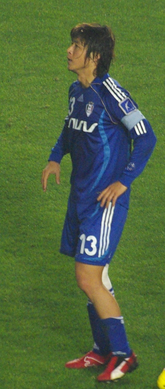 K-리그 2007 플레이오프가 끝난 후 이관우